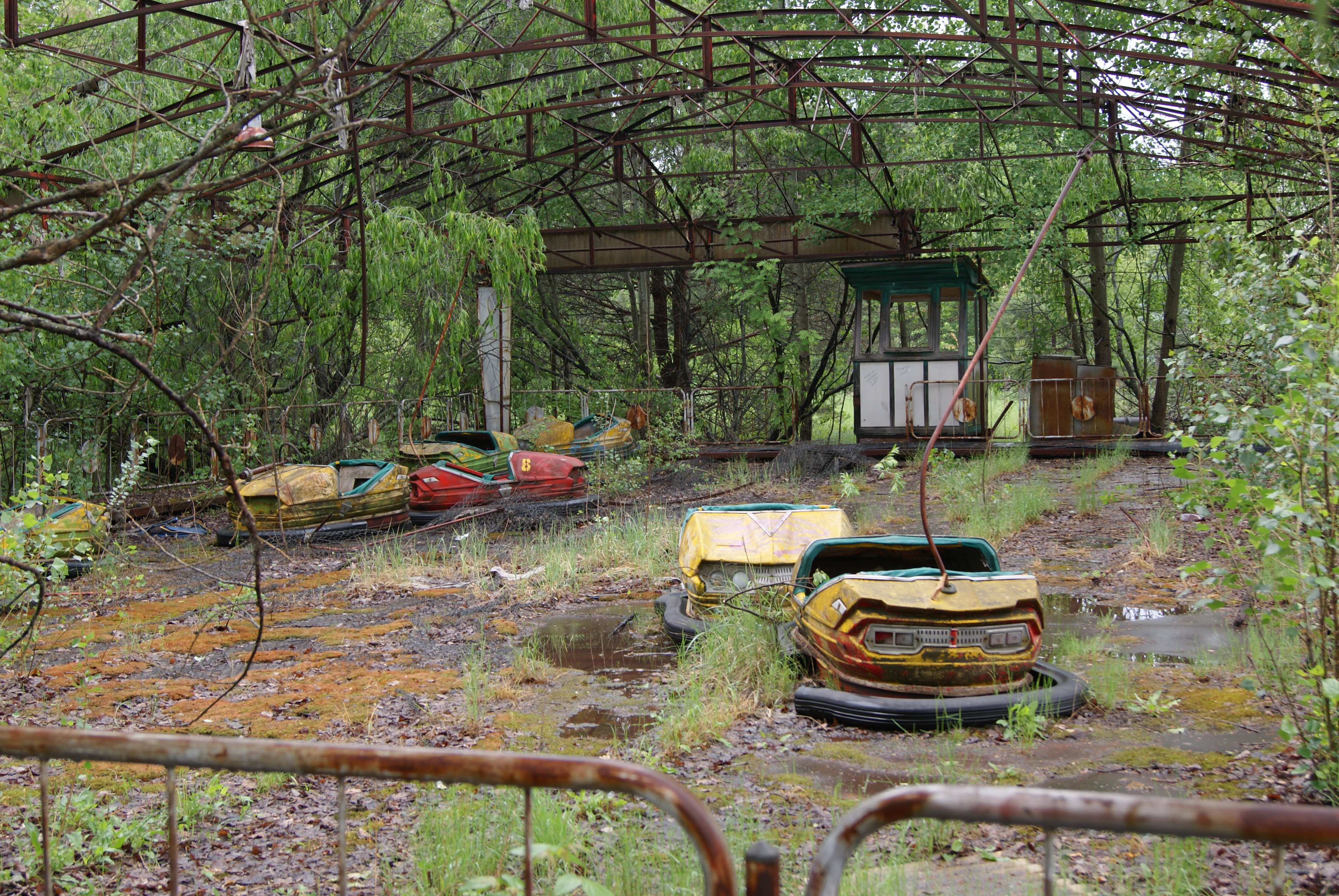 Actakcion v miscevomu parku rozvag